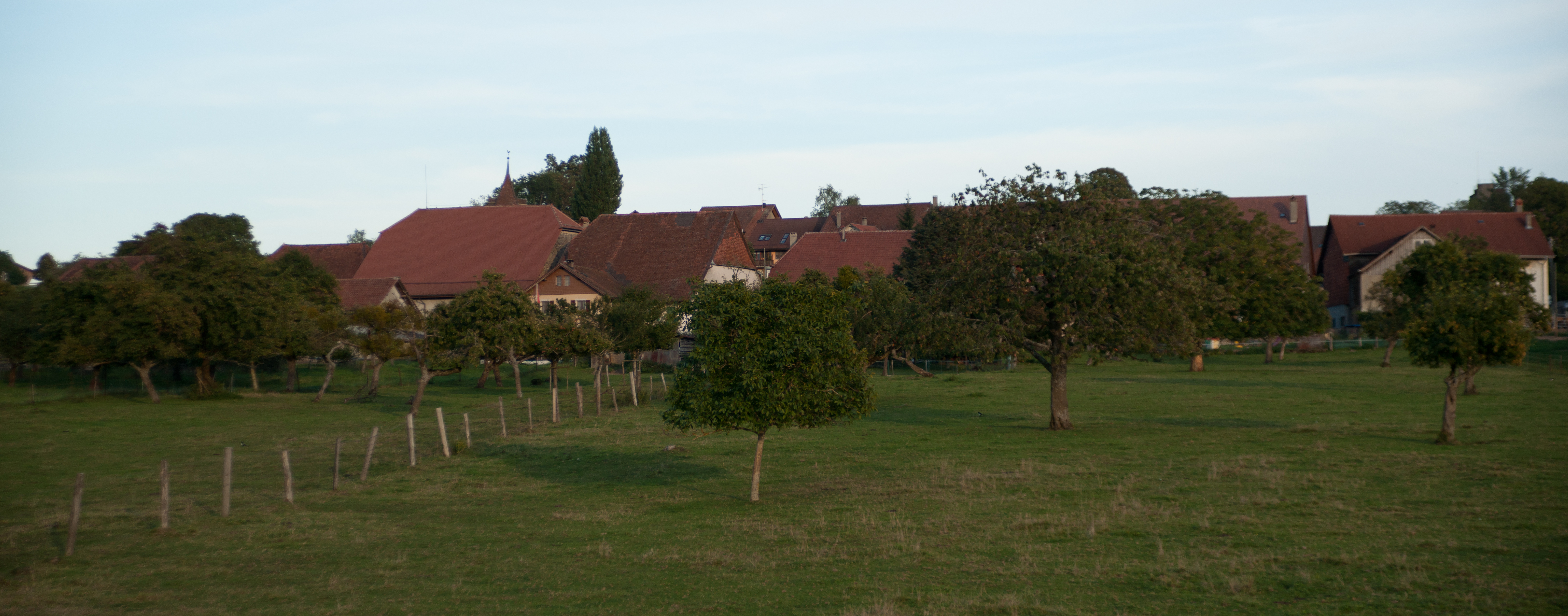 Vue d'ensemble de Vuarrens, canton de Vaud, Suisse.